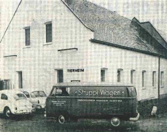 Bild vom Tierheim Mannheim aus dem Jahr 1967